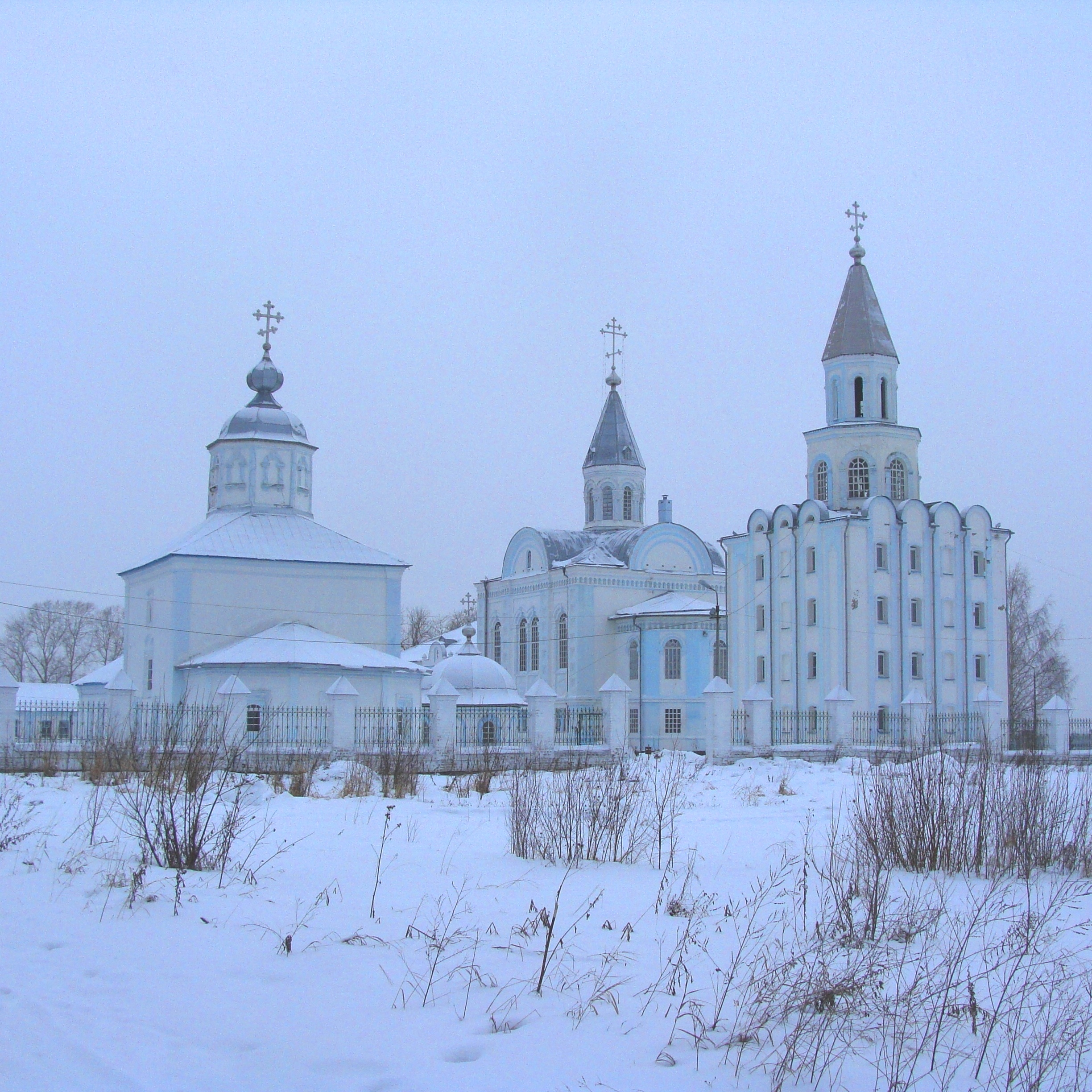 Коряжемский Николаевский монастырь